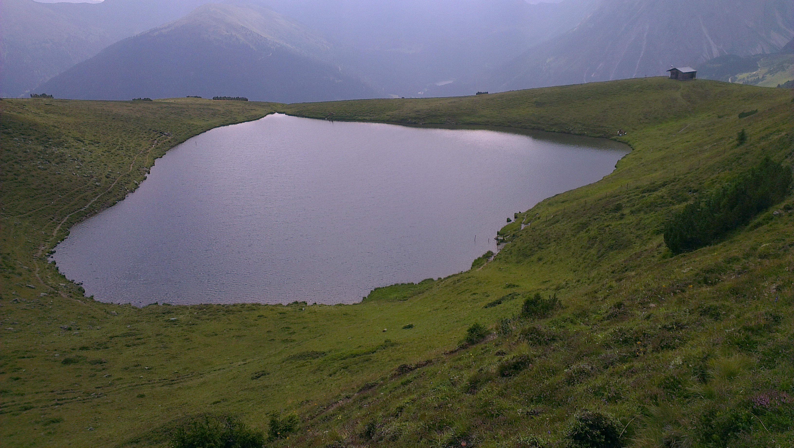 Der Lichtsee in Obernberg